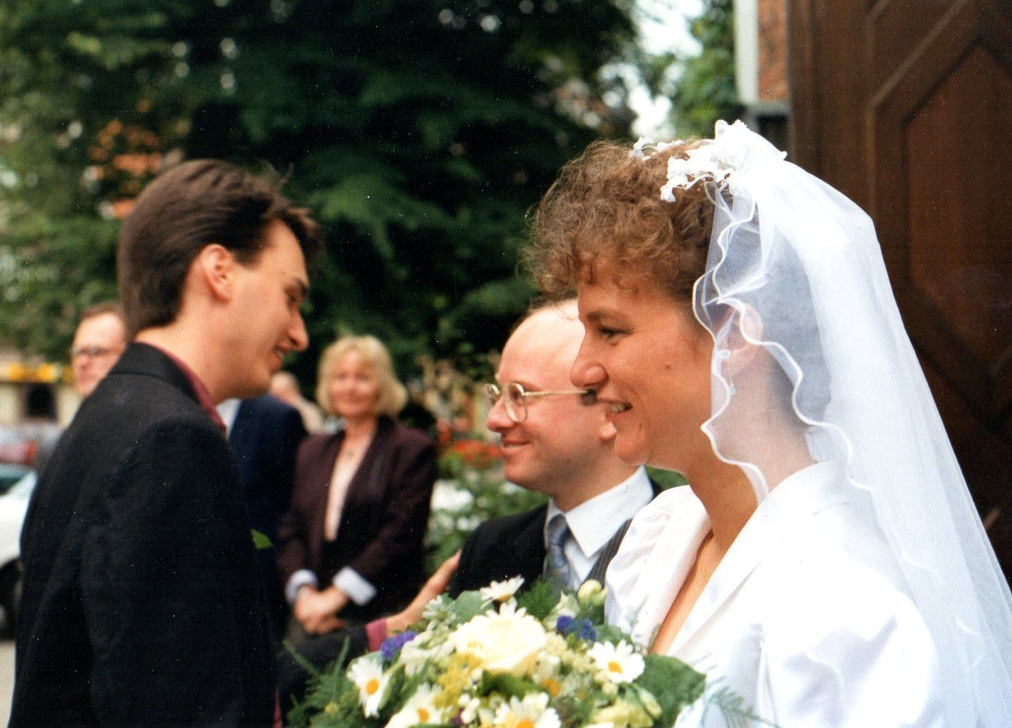 Thomas Pusch gratulas al Ian Jackson okaze de la edziĝo kun Judith Jackson en Hamburgo komence de la 1990-aj jaroj